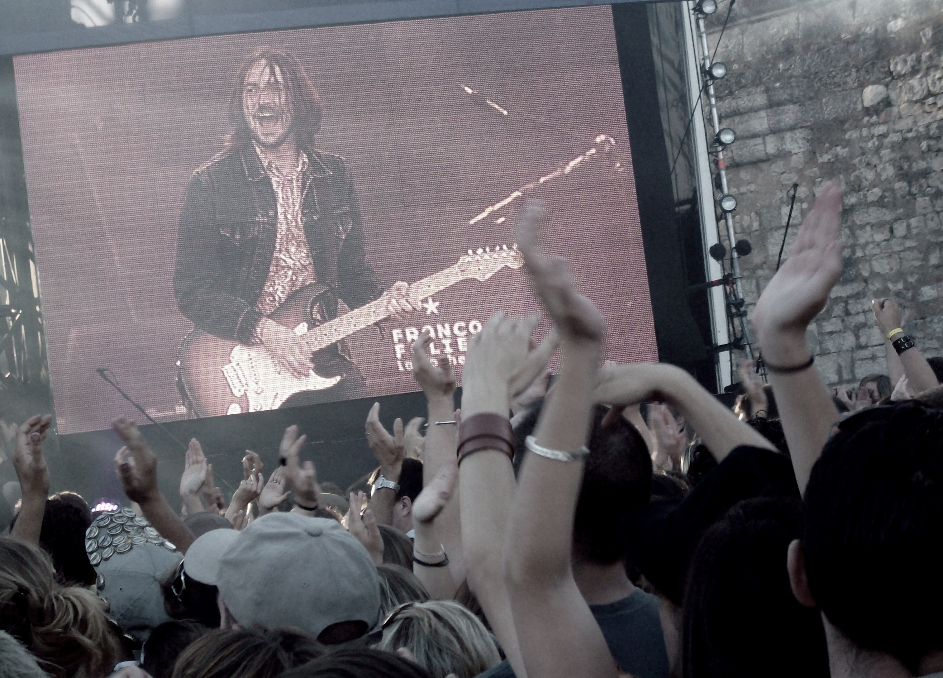 Matmatah aux Francofolies 2008 (La Rochelle) durant leur tournée d'adieu.